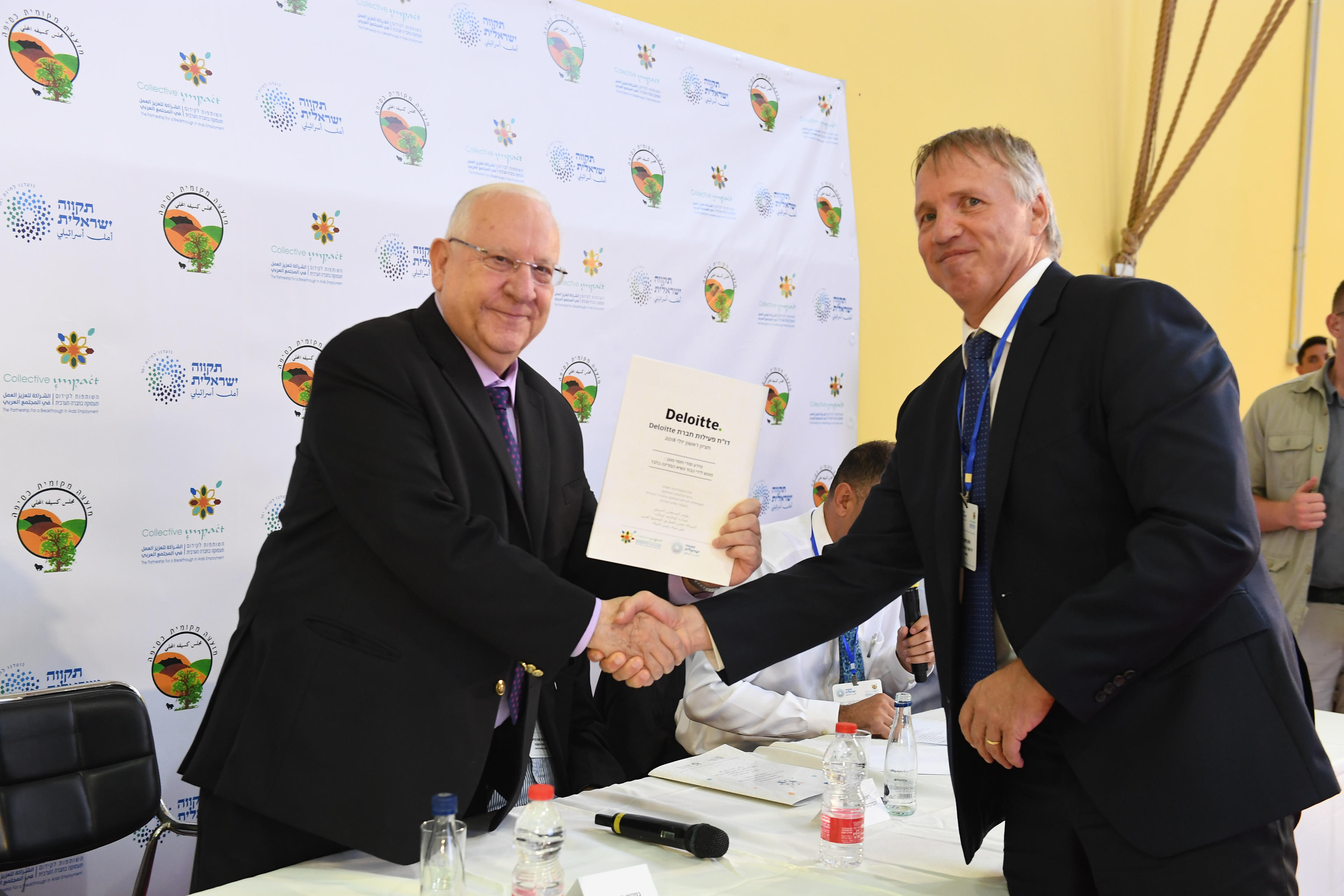 ראובן ריבלין נשיא מדינת ישראל בפגישה עם ראשי חברות גדולות המשתתפות במיזם "קולקטיב אימפקט – לקידום תעסוקה בחברה הערבית" ראובן ריבלין עם מנכ"ל דלויט ישראל מר אילן בירנפלד